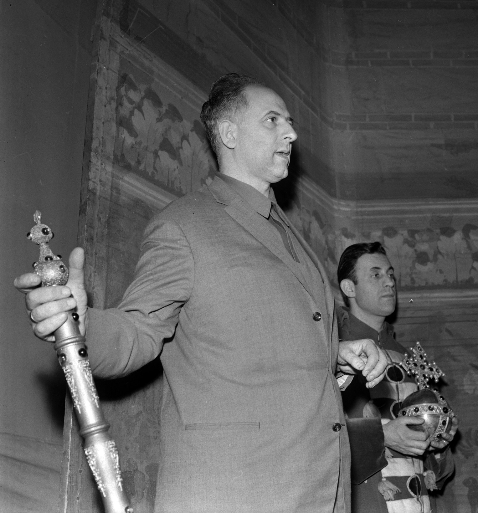 Théâtre du Capitole. Le 18 Décembre 1963. Vue de la représentation de Boris Godounov avec Yvan Pétrof au théâtre du Capitole.